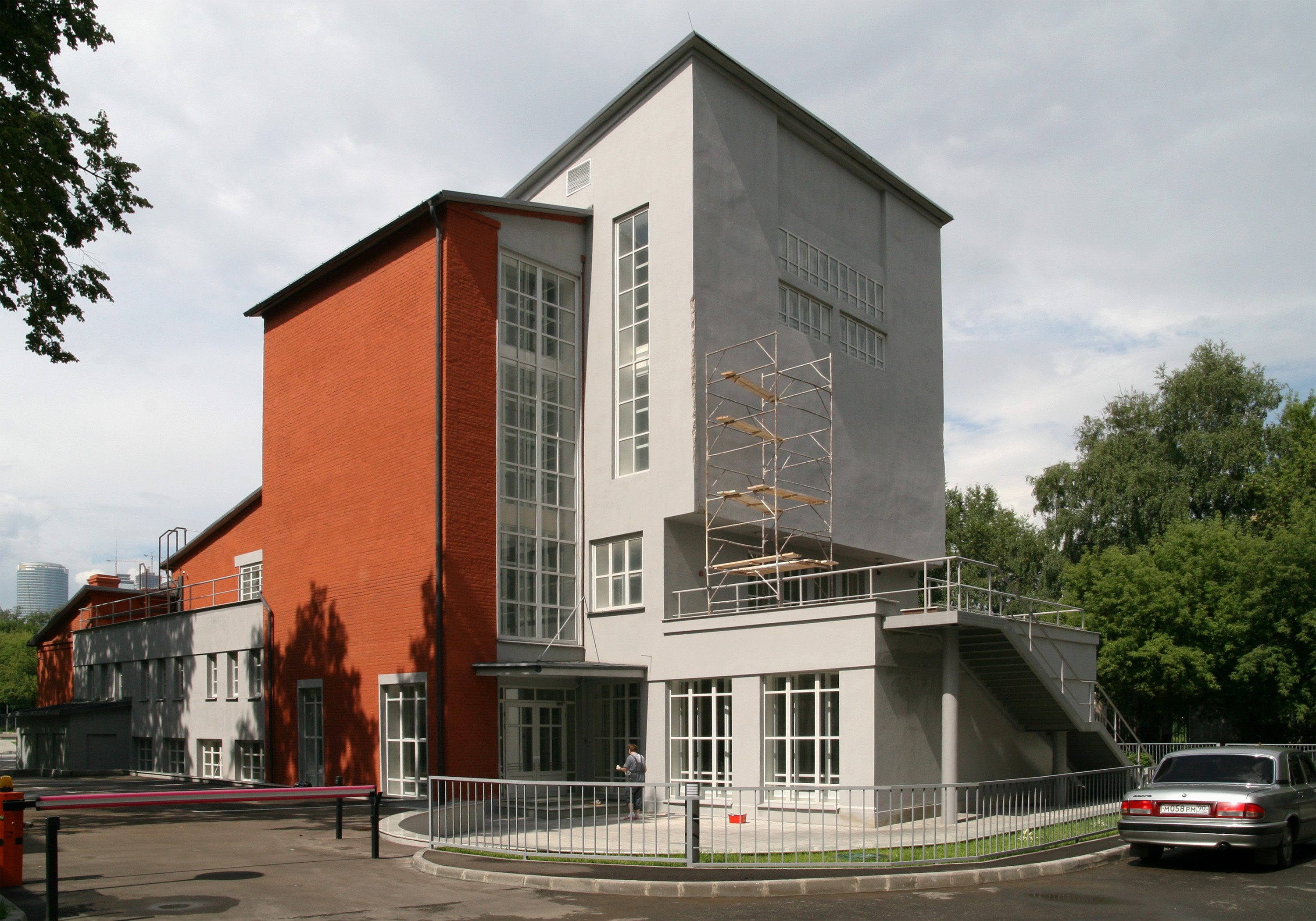 Клуб име. М.В. Фрунзе (архитектор К. С. Мельников)